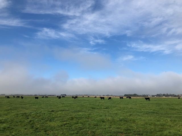 Farm In Australia 2018 June SOUTH